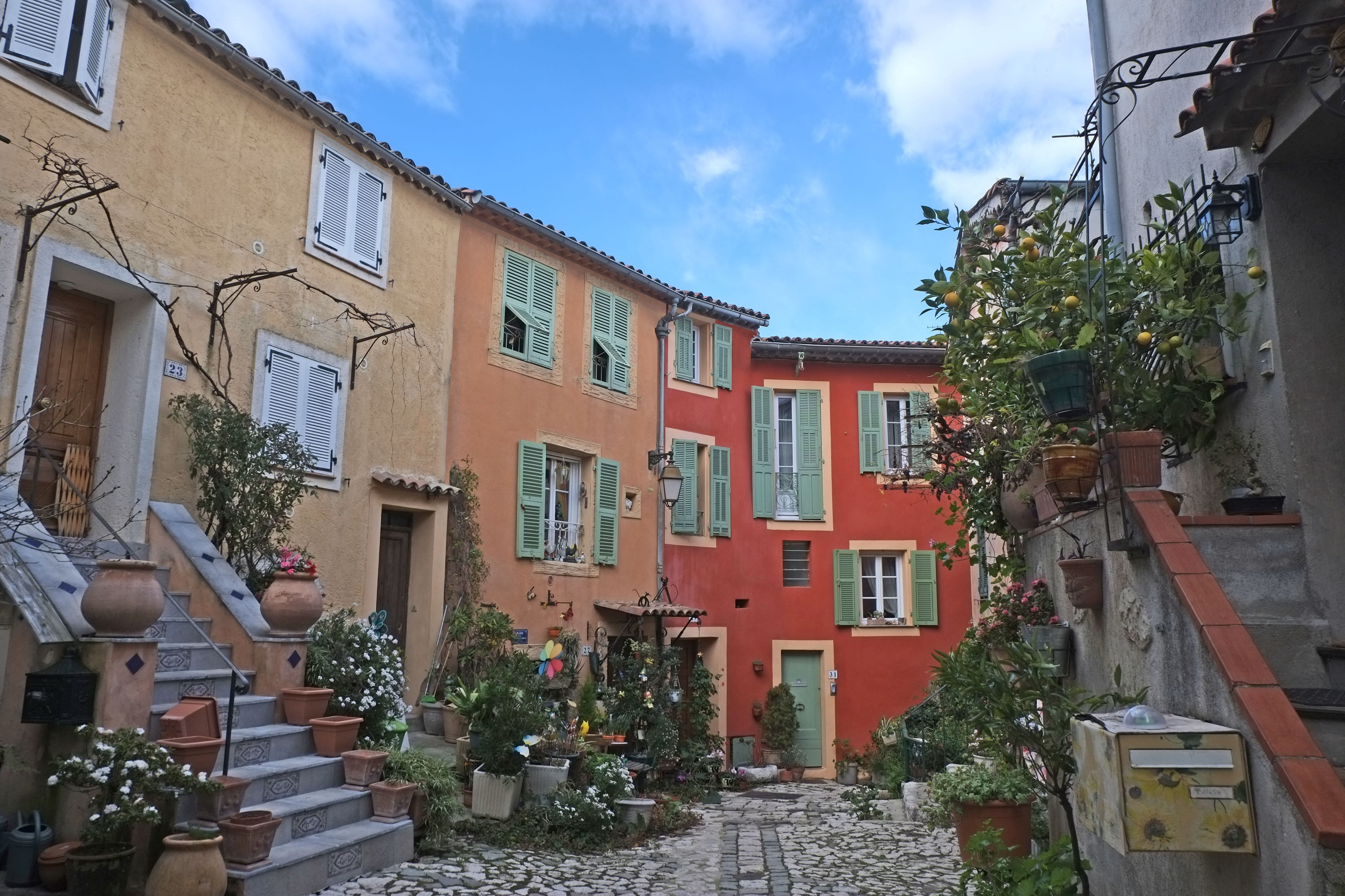 Placette derrière la place du Four de Falicon.